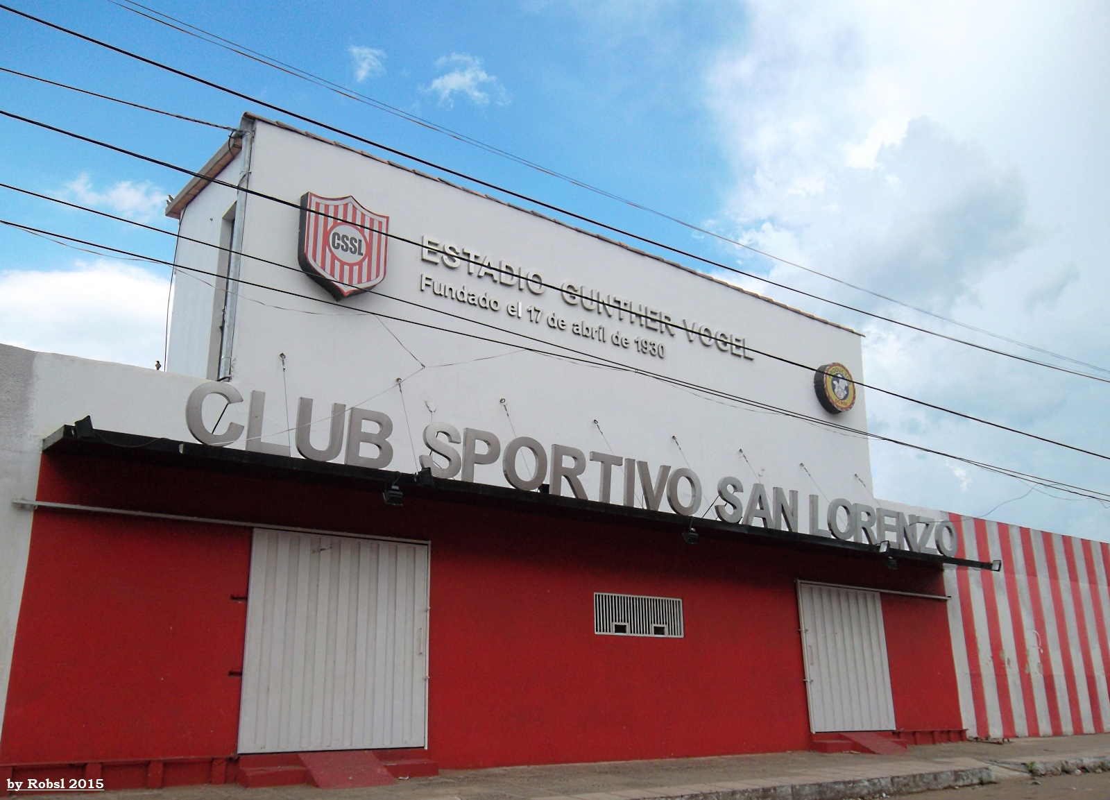 Fachada del Estadio del Club Sportivo San Lorenzo